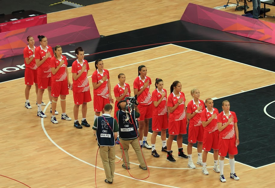 L'équipe nationale de Croatie de basket-ball féminin le 3 août à Londres.